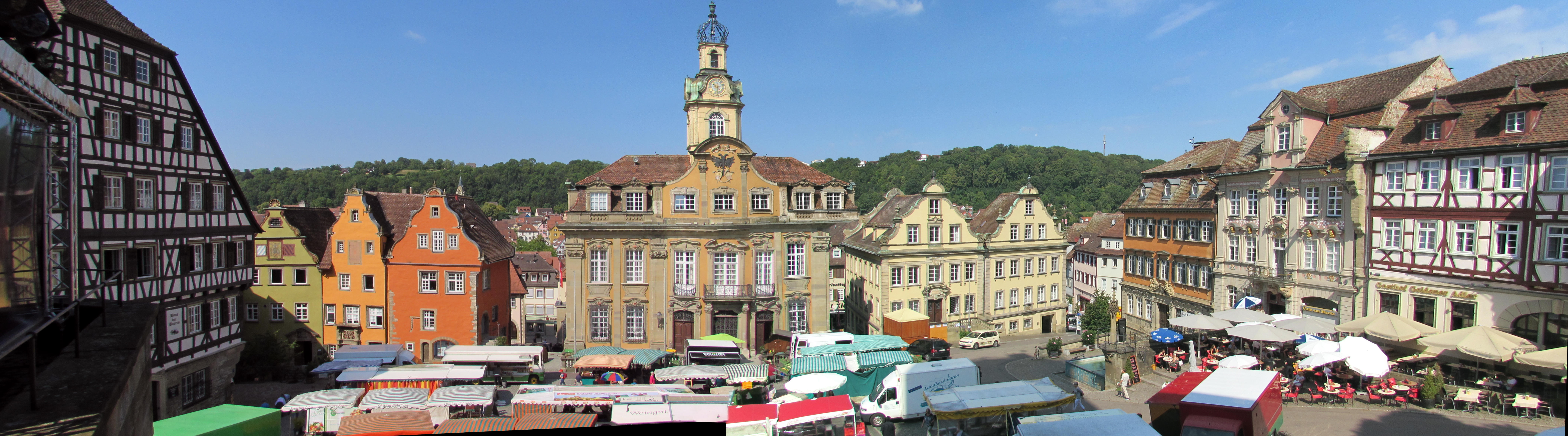 Schwäbisch HallMarktplatz Panorama